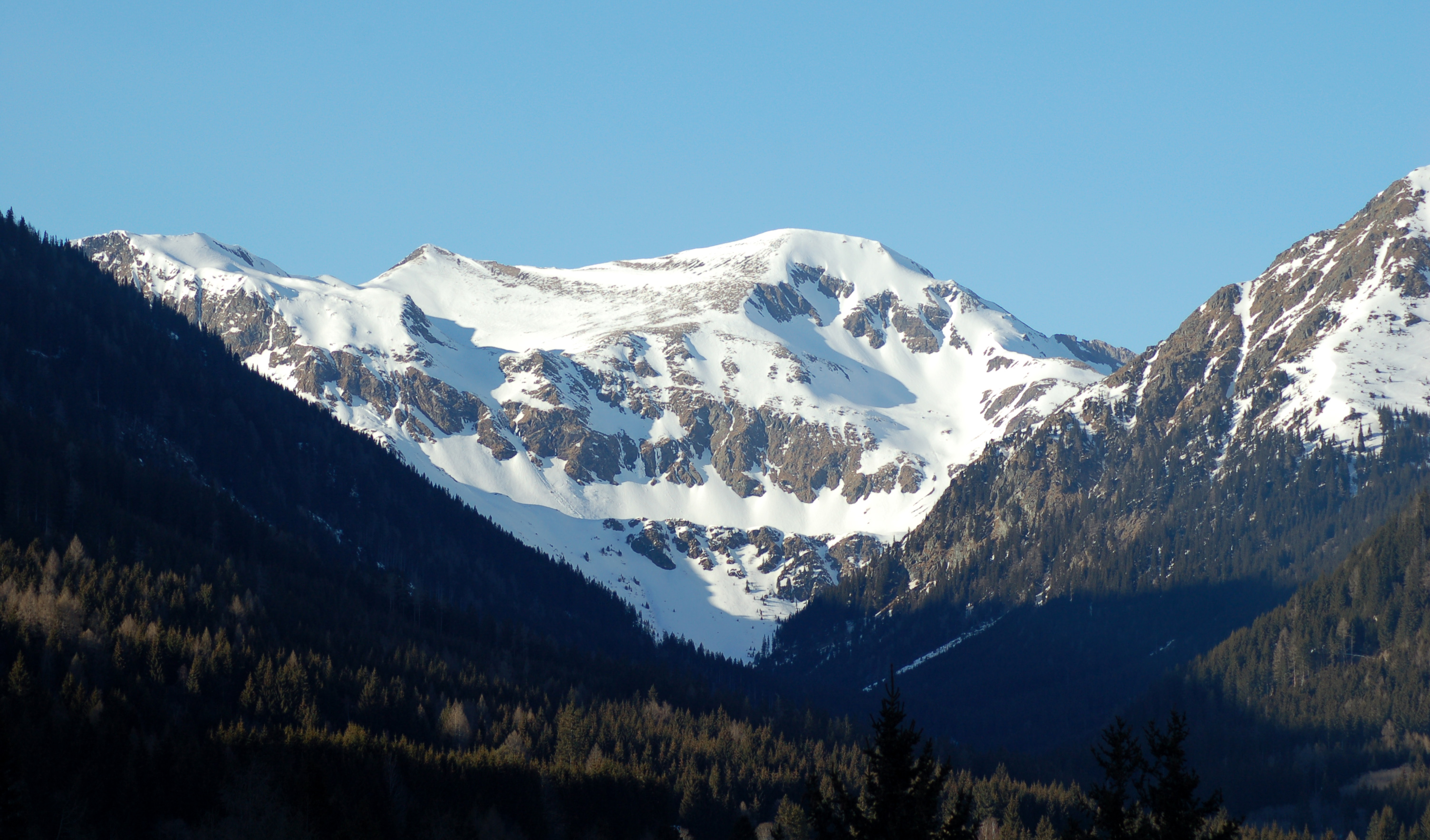 Pusterwalder Hohenwart 2363m, am Ende des Schöttlgrabens nördlich von Oberwölz in der Steiermark, Blick von Süden, links hinten im Talschluss das Glattjoch